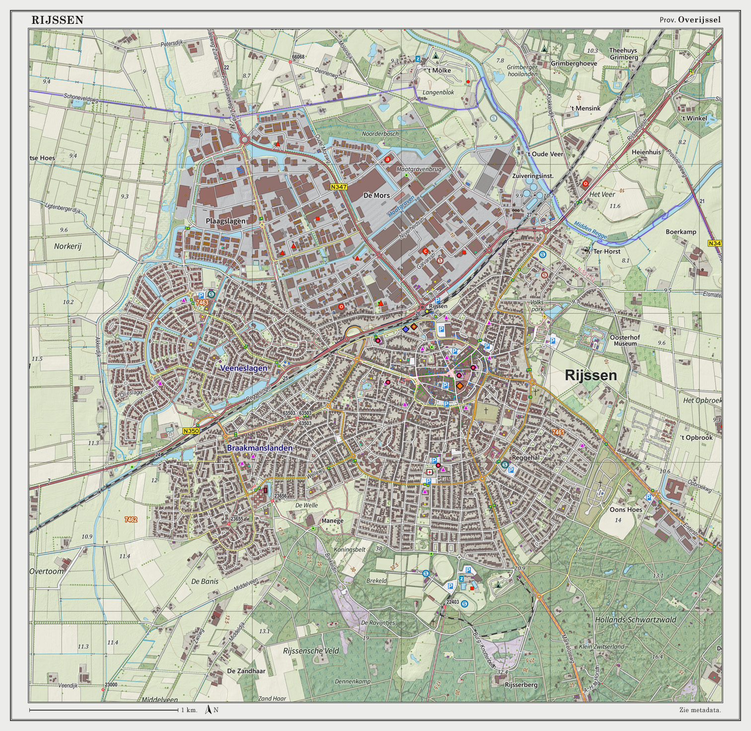 Topografische kaart van Rijssen (woonplaats). Resolutie: 300 pixels/km. Kaartbeeld samengesteld uit de open geodata van de Top10NL en Top25namen (Basisregistratie Topografie, Kadaster), Creative Commons BY licentie. Gebouwvlakken uit open geodata BAG extract. Wegen uit de OpenStreetMap. Reliëfschaduw uit de Actuele Hoogtekaart AHN2. Samenstelling en kleurenschema: Jan-Willem van Aalst, met QGIS2. Zie ook de Legenda.